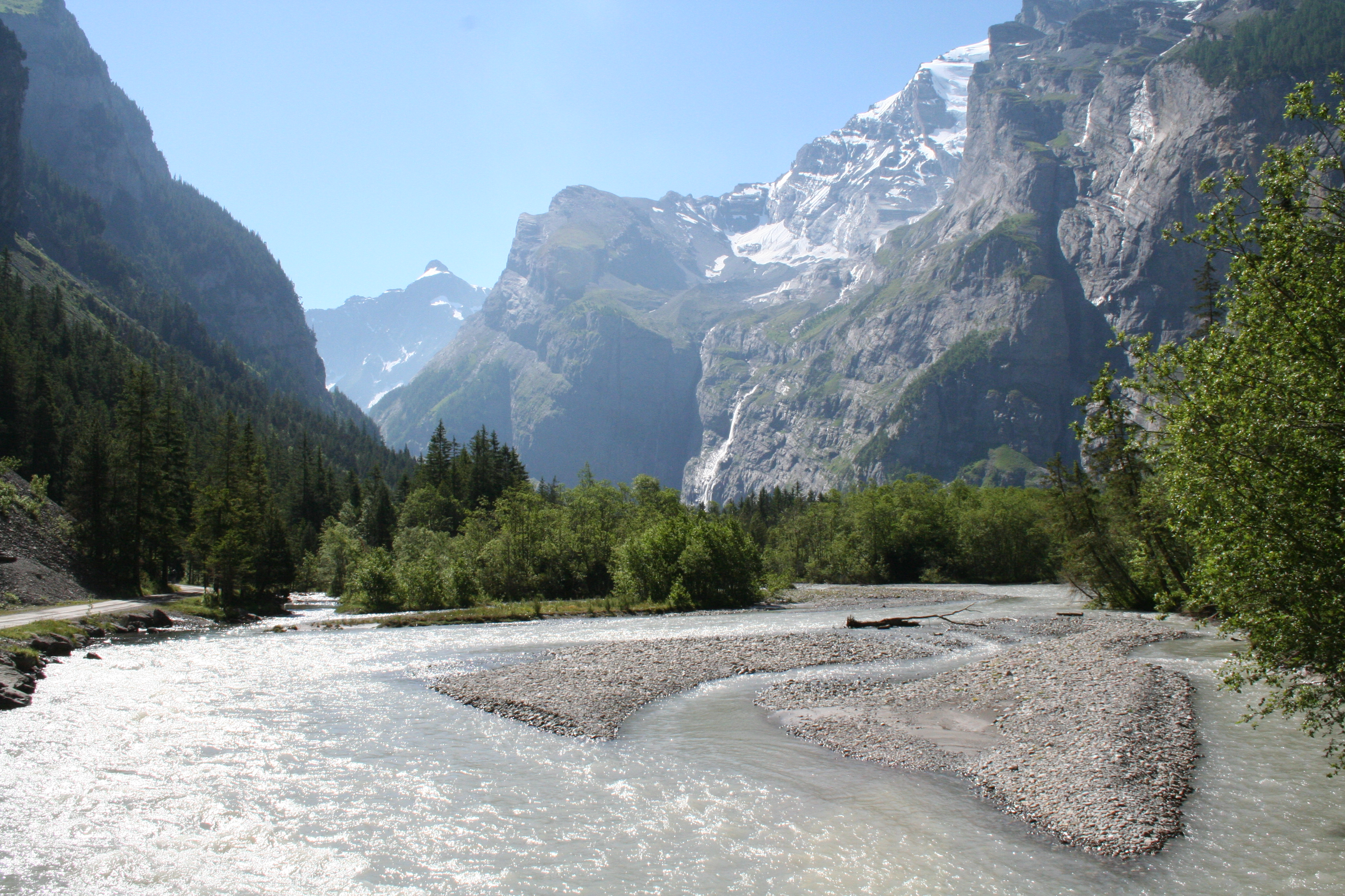 Gasternholz – Die Kander am Eingang zum Gasterntal